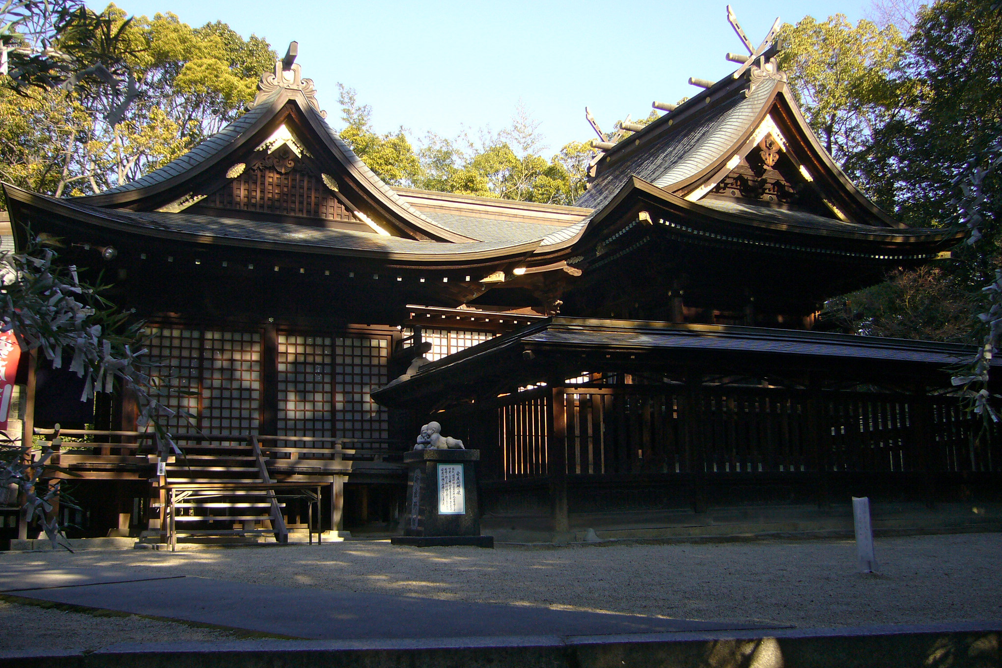 Bingogokoku-jinja in Fukuyama, Hiroshima, Japan